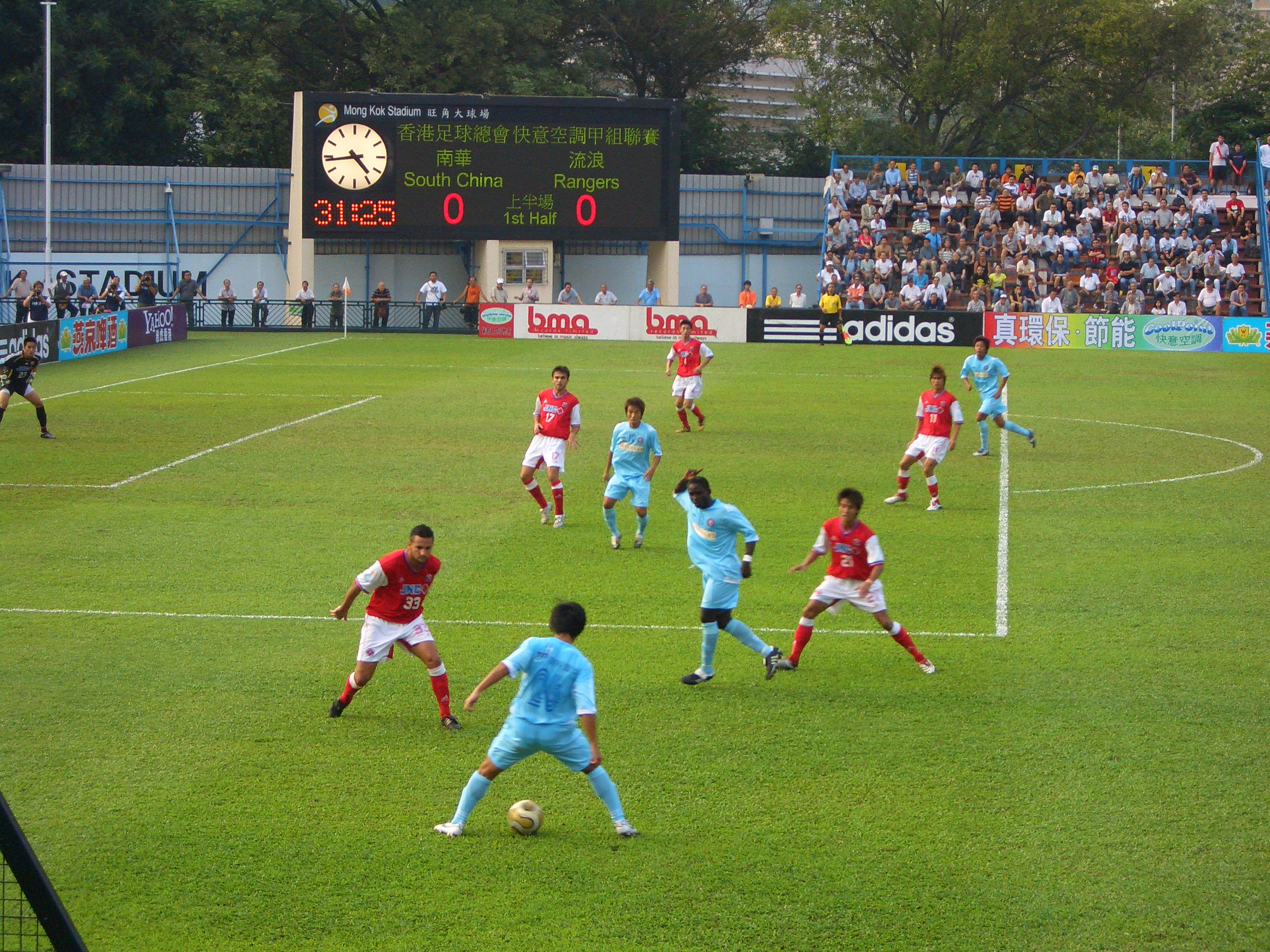 香港甲組足球聯賽比賽，於10月28日舉行，由zh:南華對zh:流浪足球會。